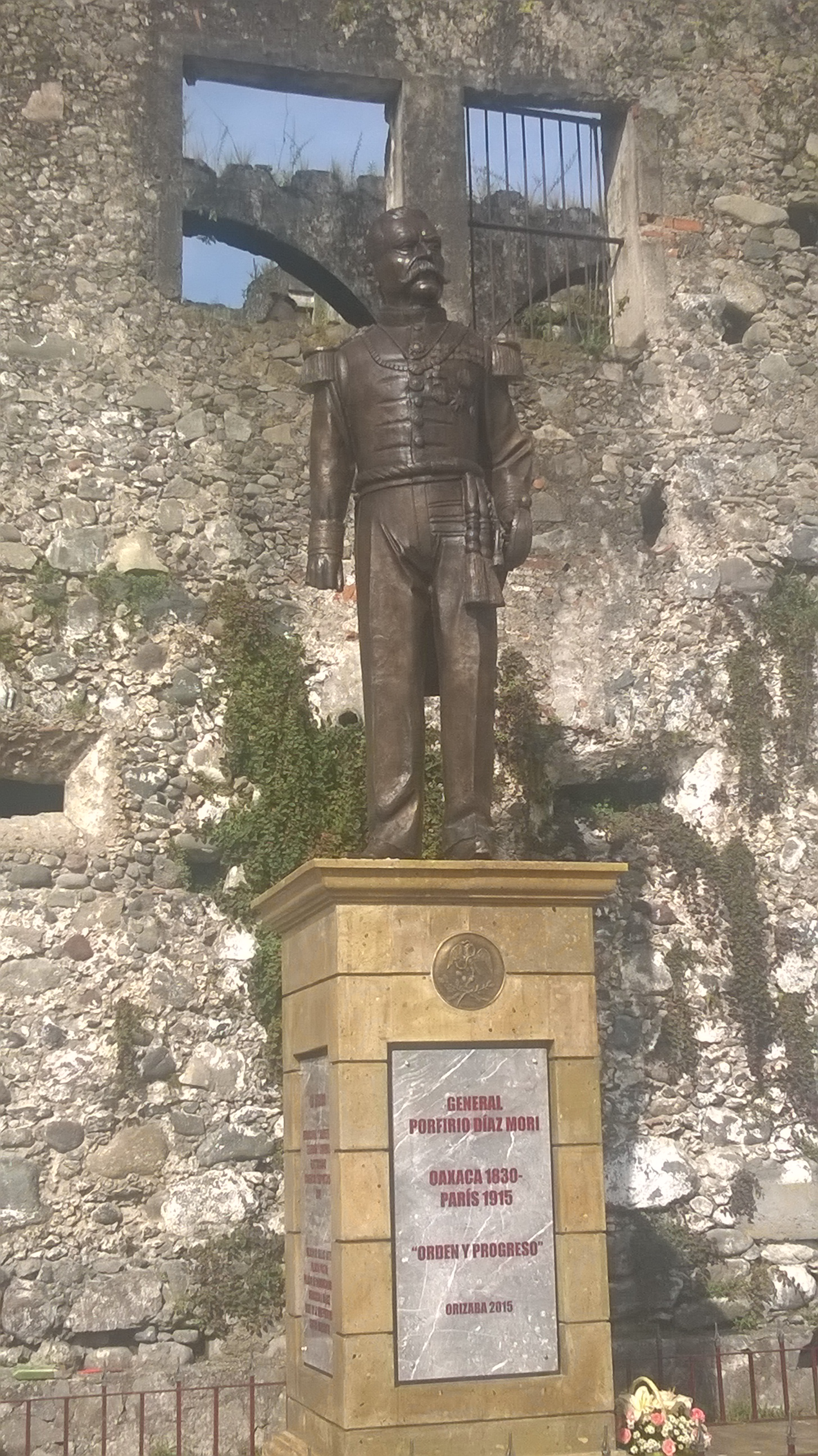 Monumento al General Porfirio Díaz en Orizaba, Ver.